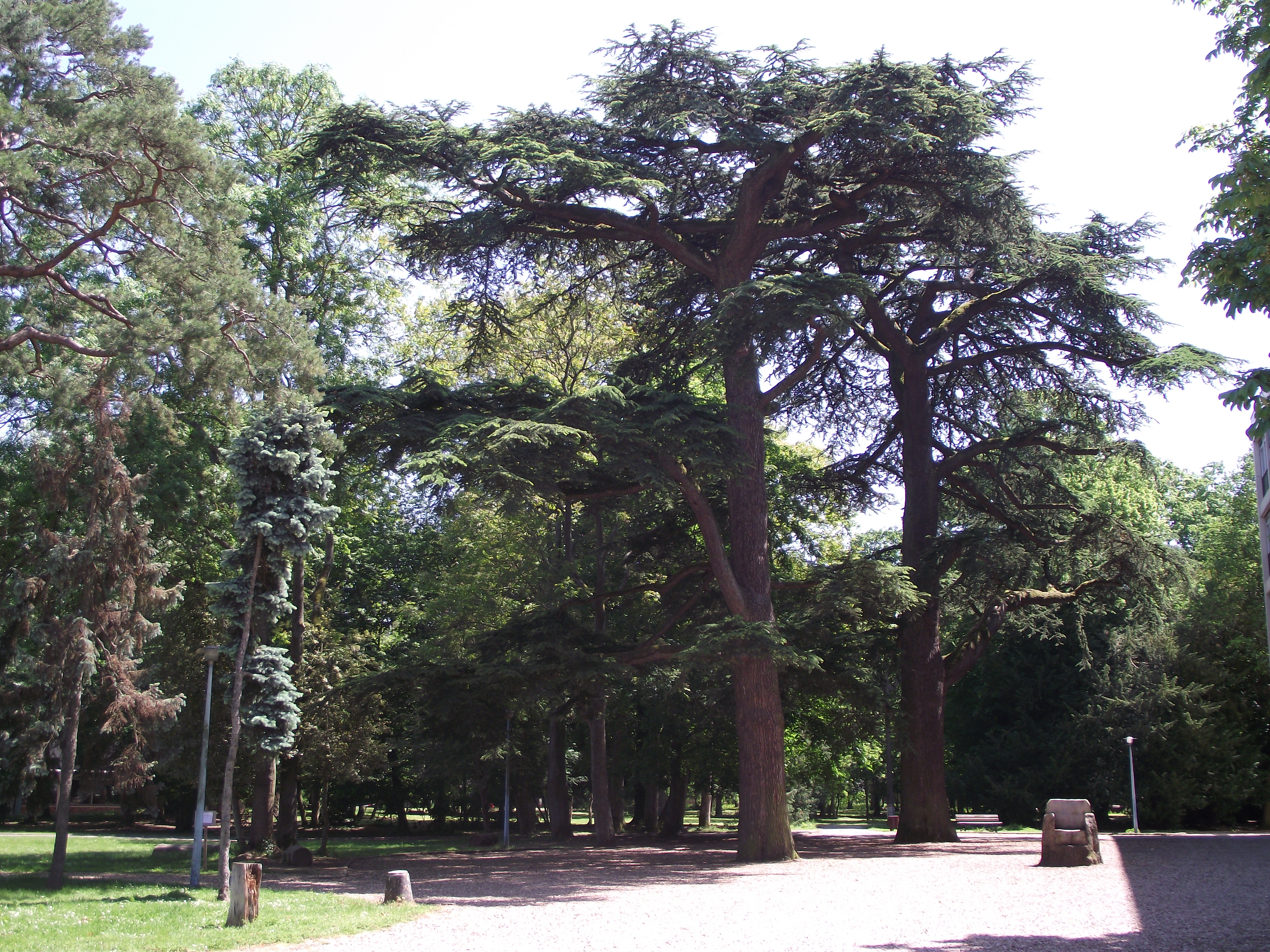 Parc de la cité scolaire Augustin-Thierry